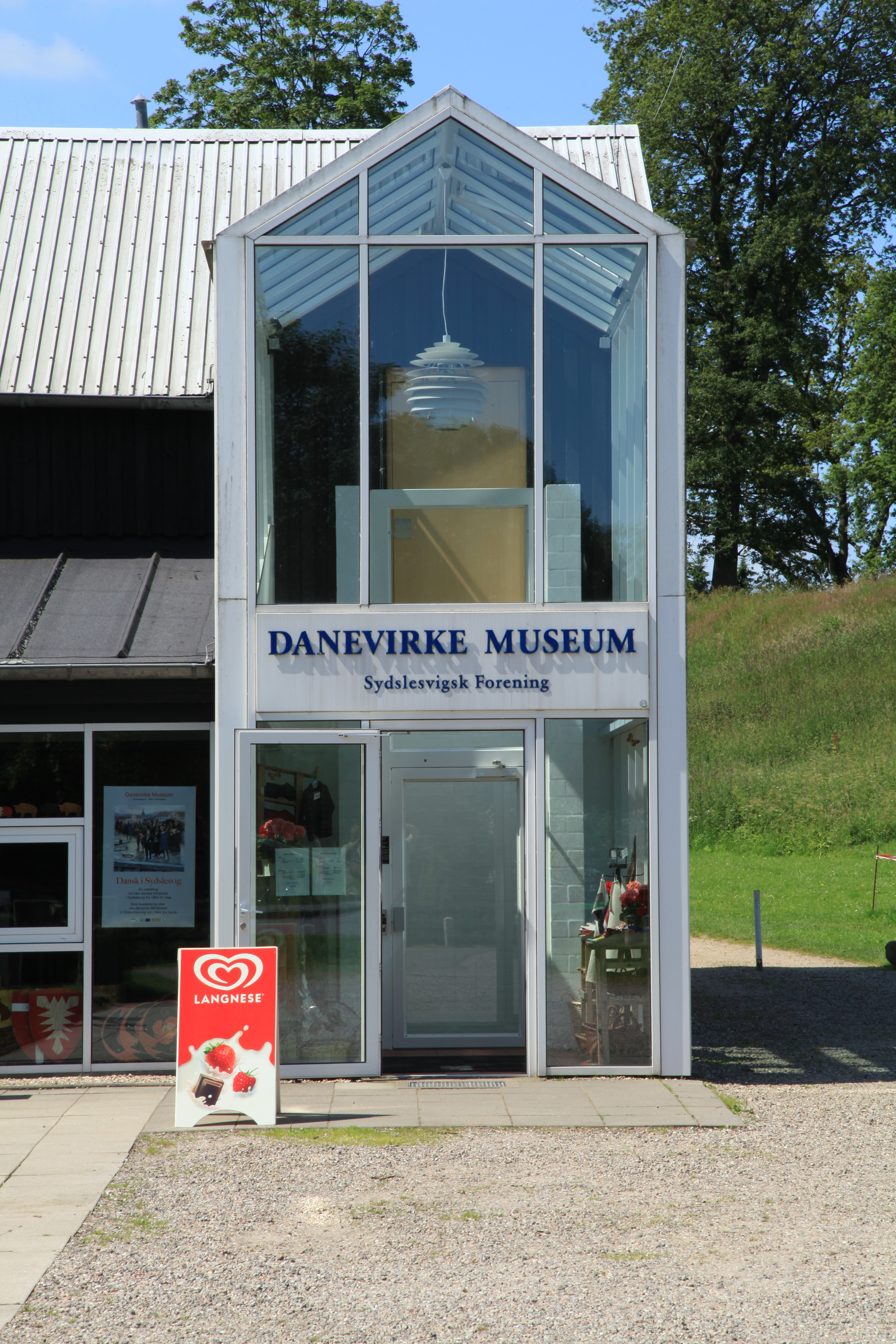 Danewerk Museum an der Straße Ochsenweg in Dannewerk